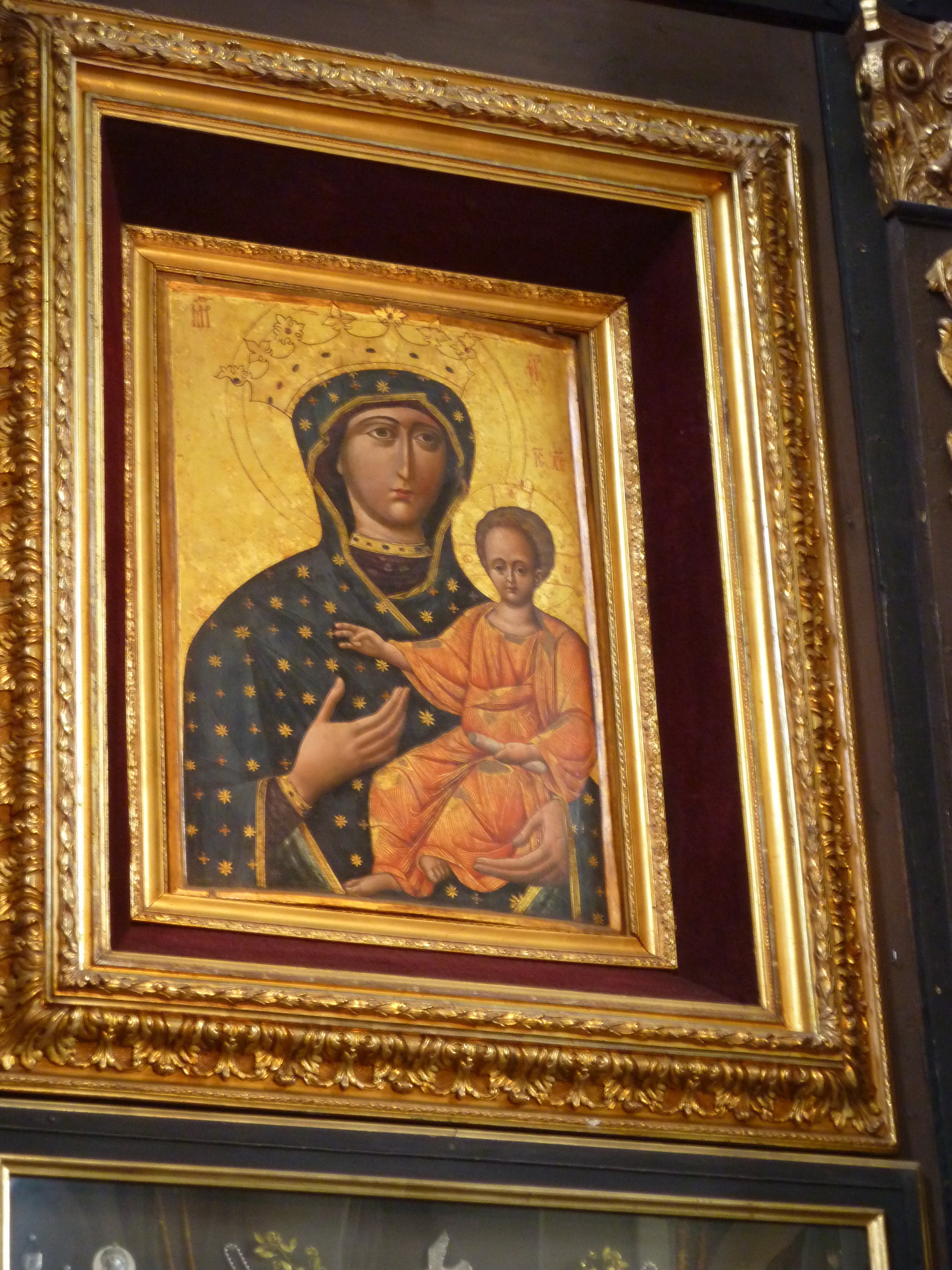 Cudowny obraz Matki Boskiej Zwycięskiej (Jackowej) przeniesiony w 1946 r. ze Lwowa w bazylice św. Mikołaja w Gdańsku